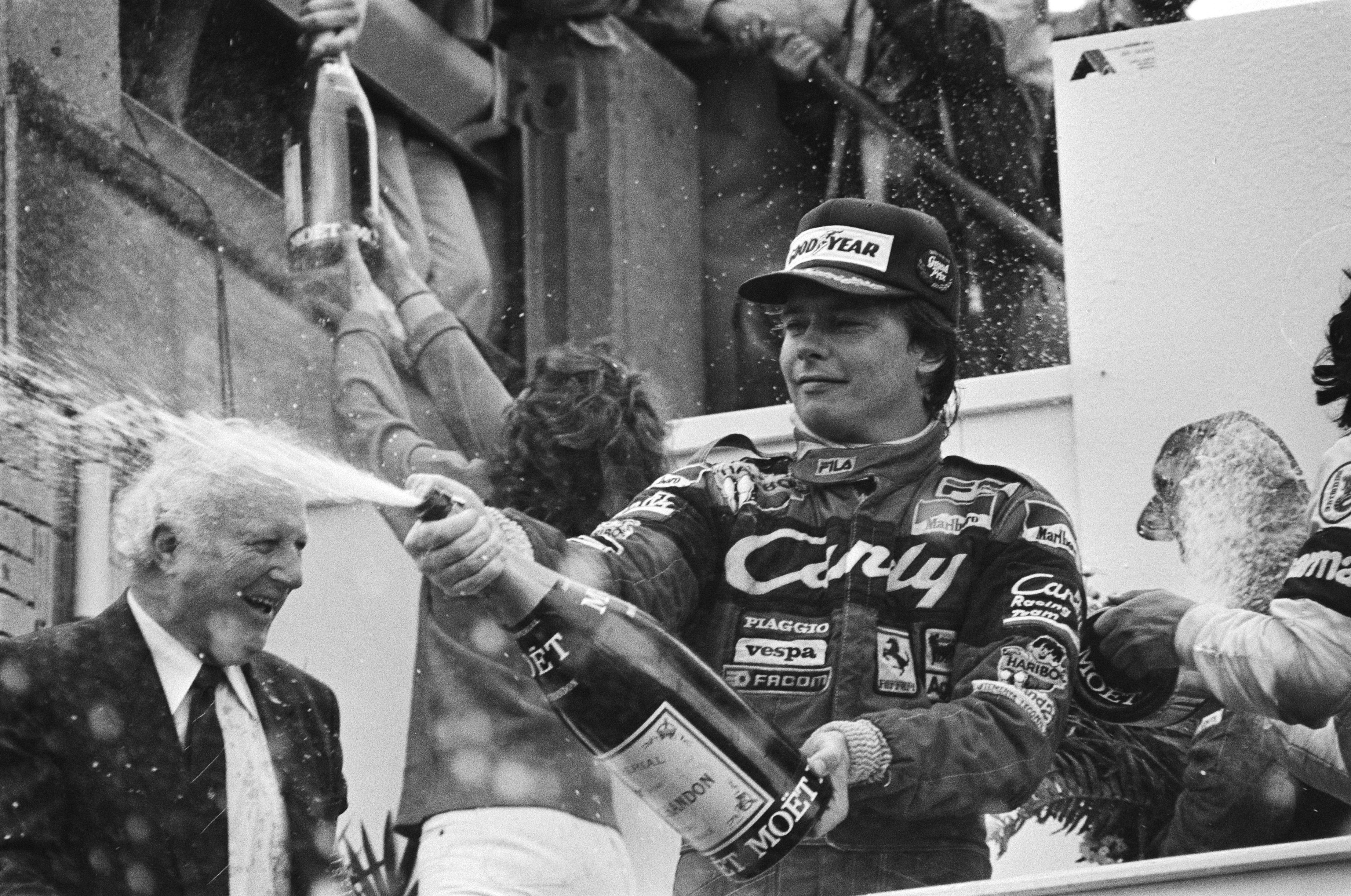 Grand Prix van Nederland te Zandvoort; winnaar Pironi me champagne.